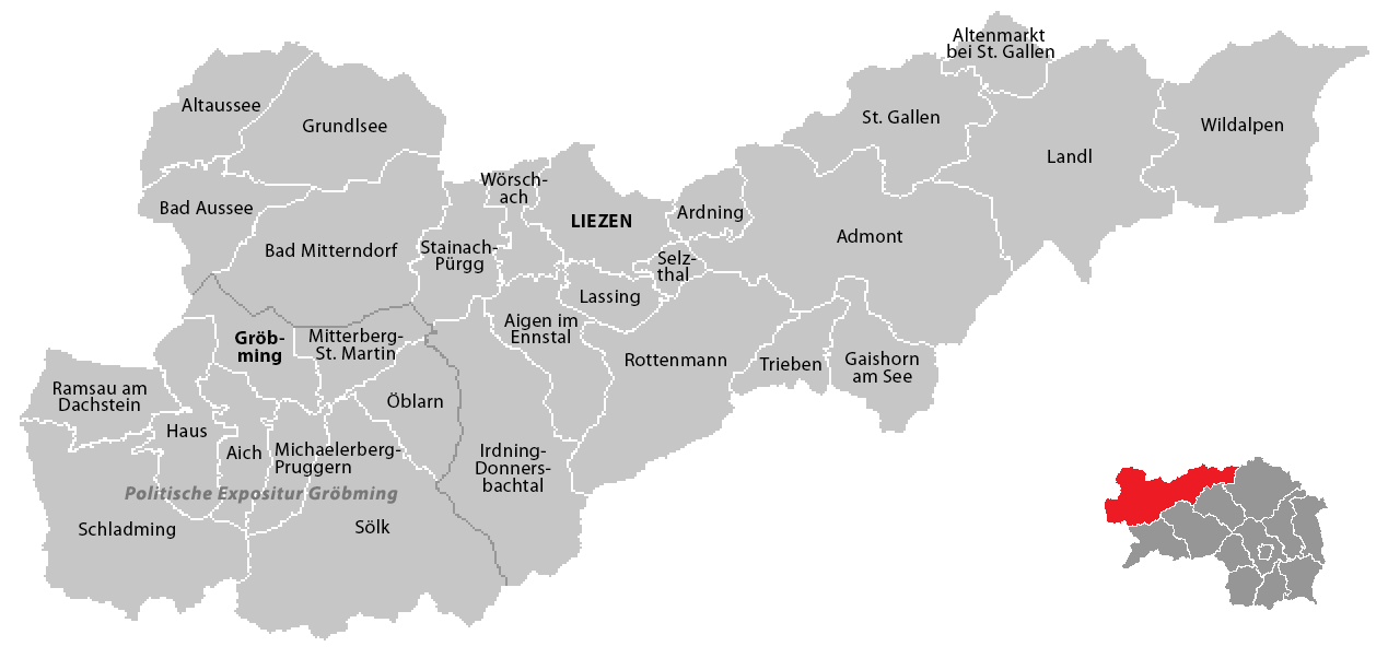 Gemeinden im Bezirk Liezen (Steiermark), Stand: 1. Januar 2015